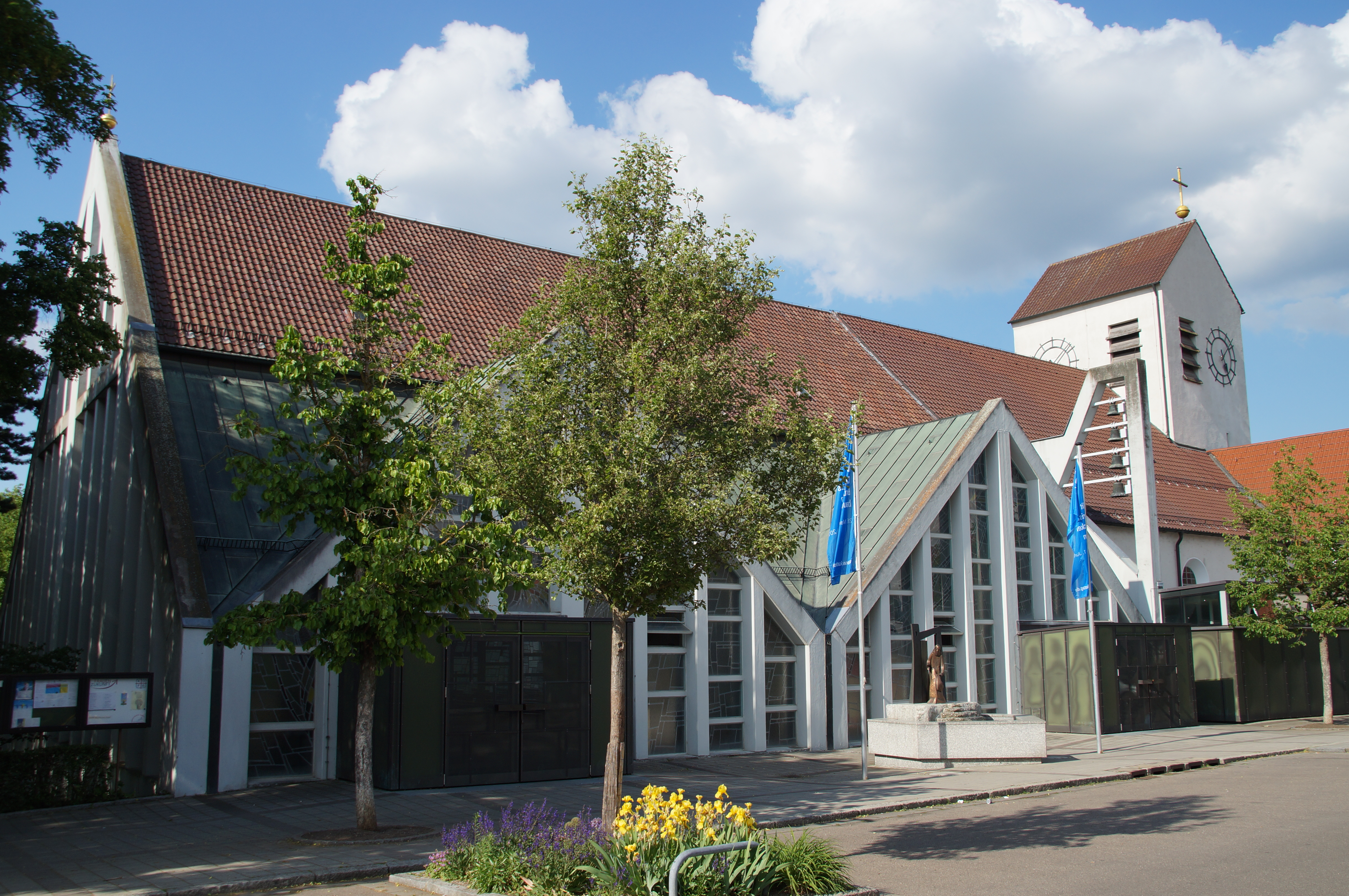 Katholische Pfarrkirche St. Konrad, giebelständiger Saalbau mit steilem Satteldach, eingezogenem Chor mit Chorturm und seitlichen Doppelgiebeln in Rasterbauweise, 1935/36 von Max Wittmann, 1966/67 Erweiterungsbau von Franz Günthner; mit Ausstattung.